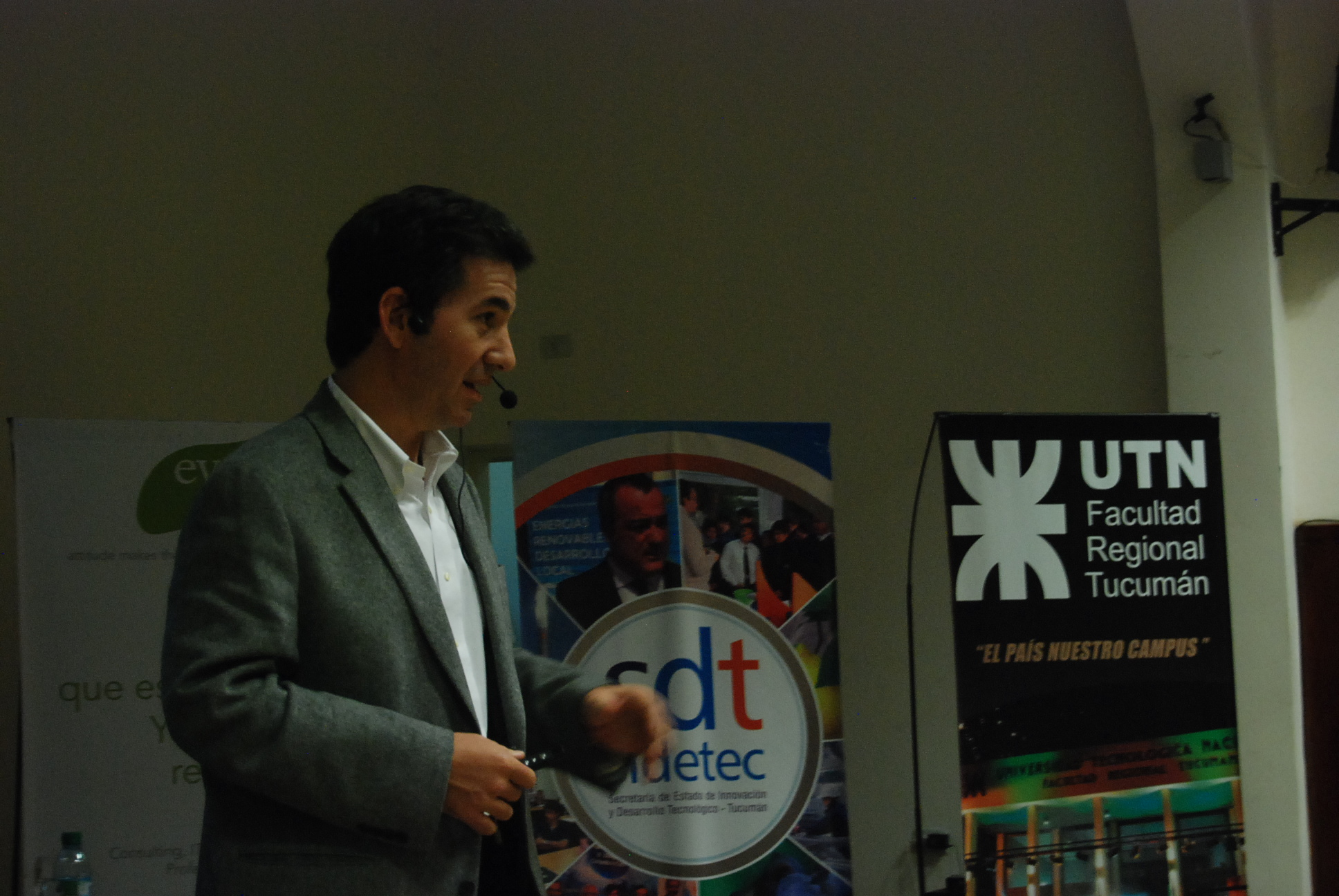 El Lic. Andy Freire en la Semana de la Ingeniería 2013